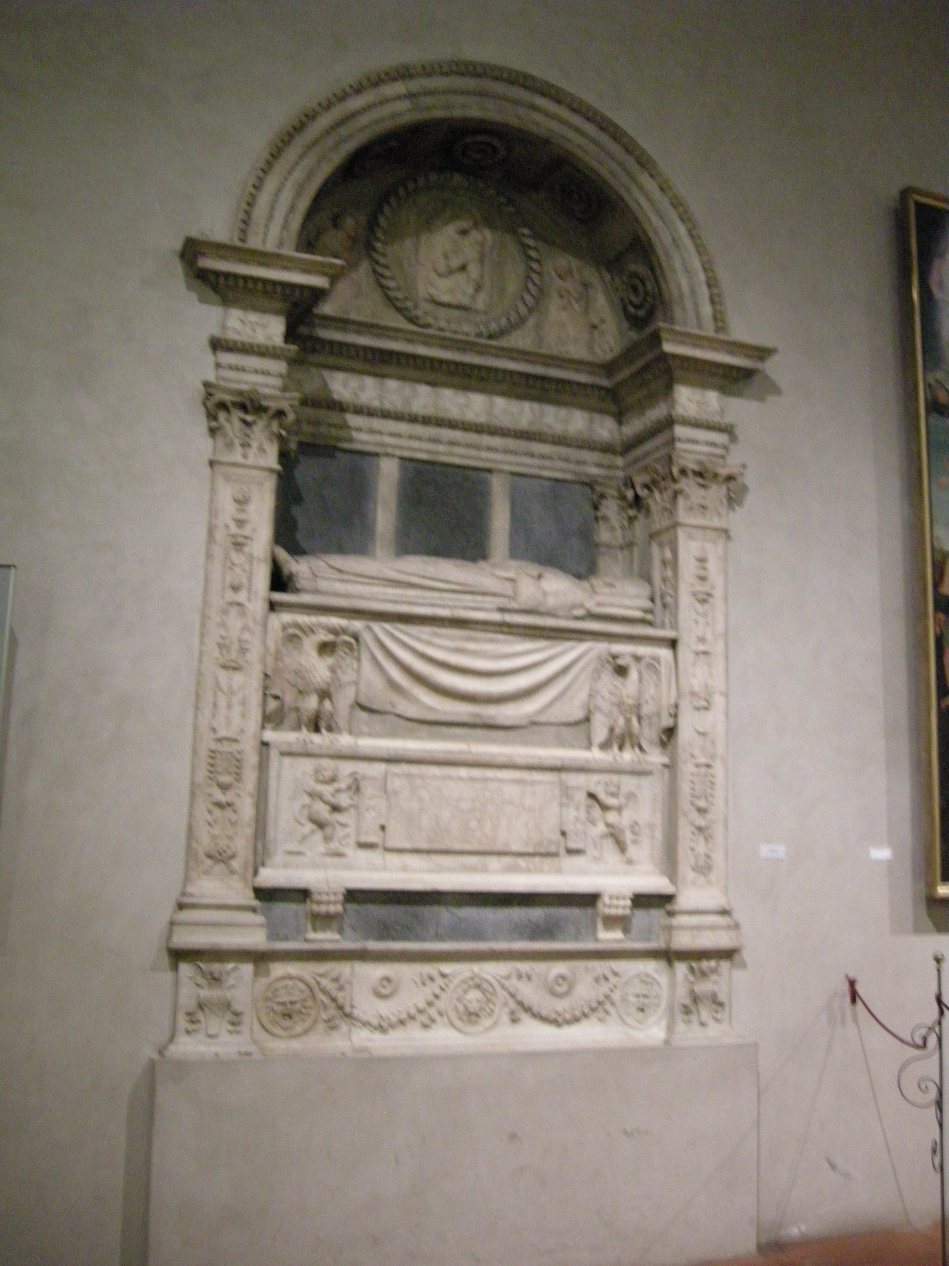 Duomo di sansepolcro, interno, scuola di rossellino, monumento funebre a simone graziani